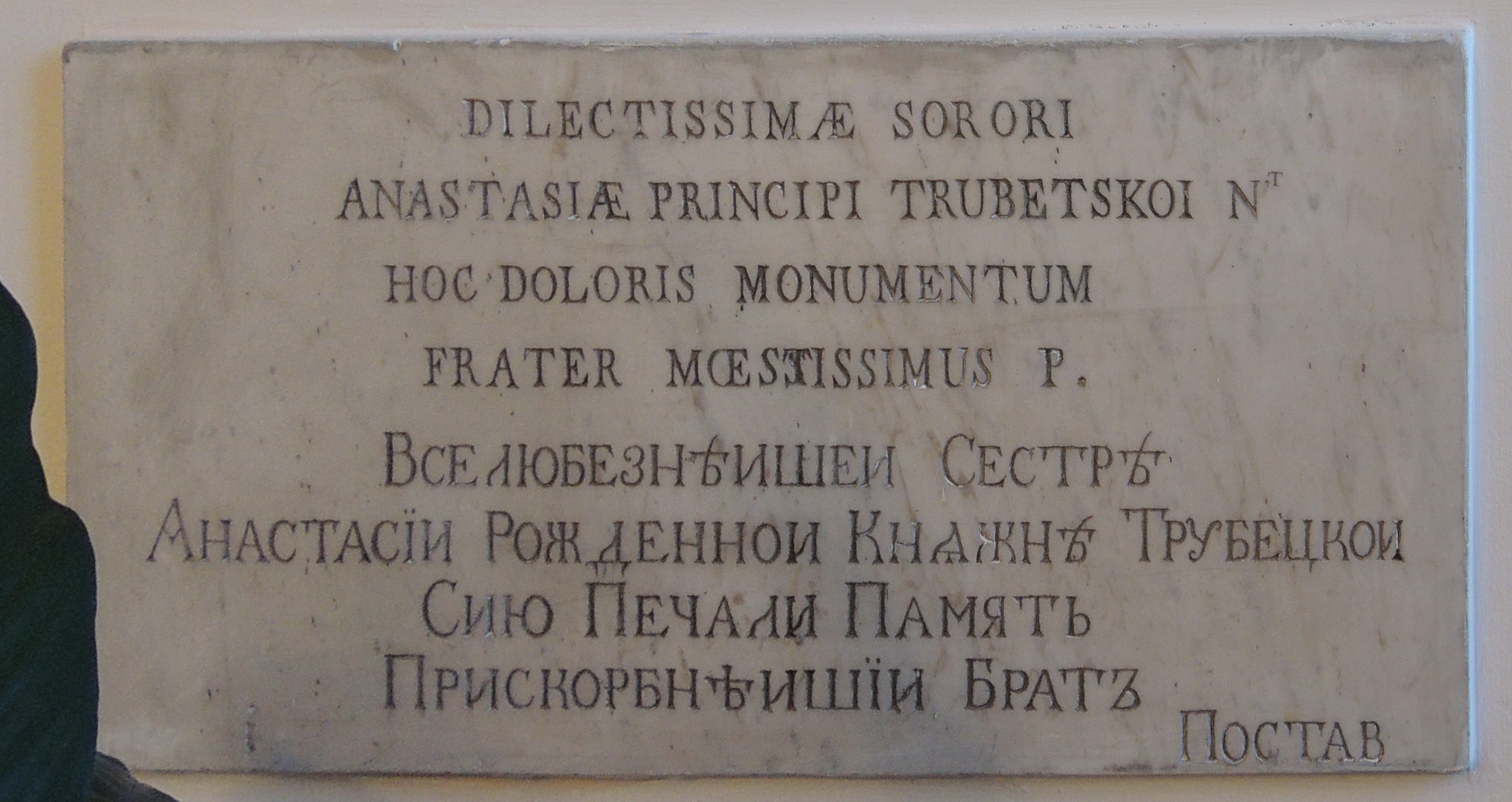 Благовещенская церковь Александро-Невской лавры. Гессен-Гомбургская, Анастасия Ивановна, урожд. кн. Трубецкая (1700—1755). Плита с эпитафией на русском и латинском языках. Надпись: "Вселюбезнейшей Сестре Анастасии Рожденной княжне Трубецкой Сию Печали Память Прискорбнейший брат "